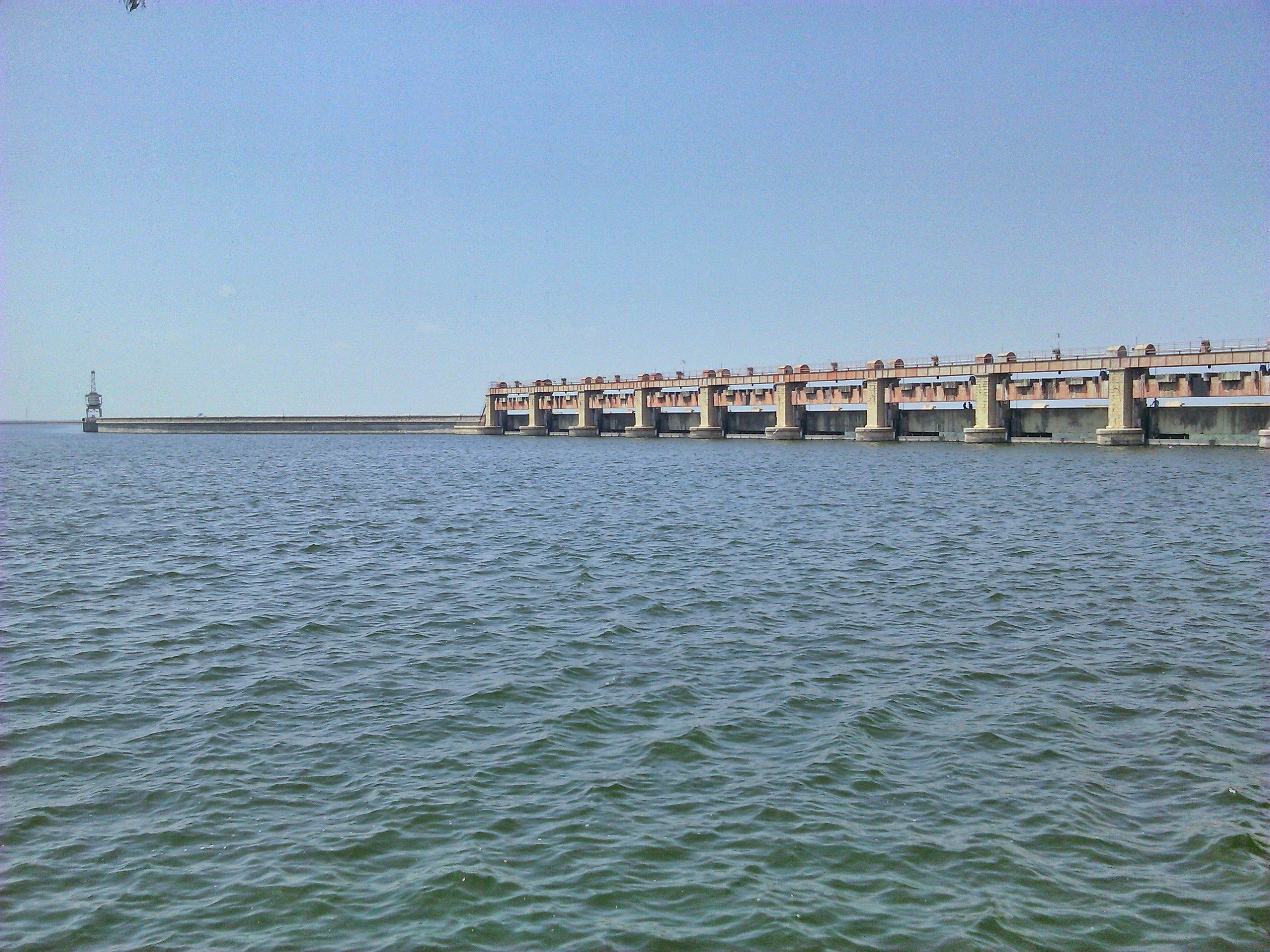 Nizam Sagar,Nizamabad